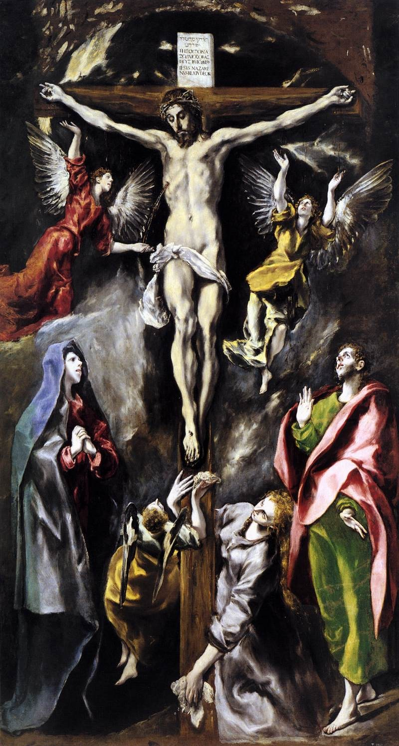 La obra representa a Jesucristo crucificado, hallándose a sus pies su madre, la Virgen María, San Juan Evangelista y María Magdalena, entre otros personajes.